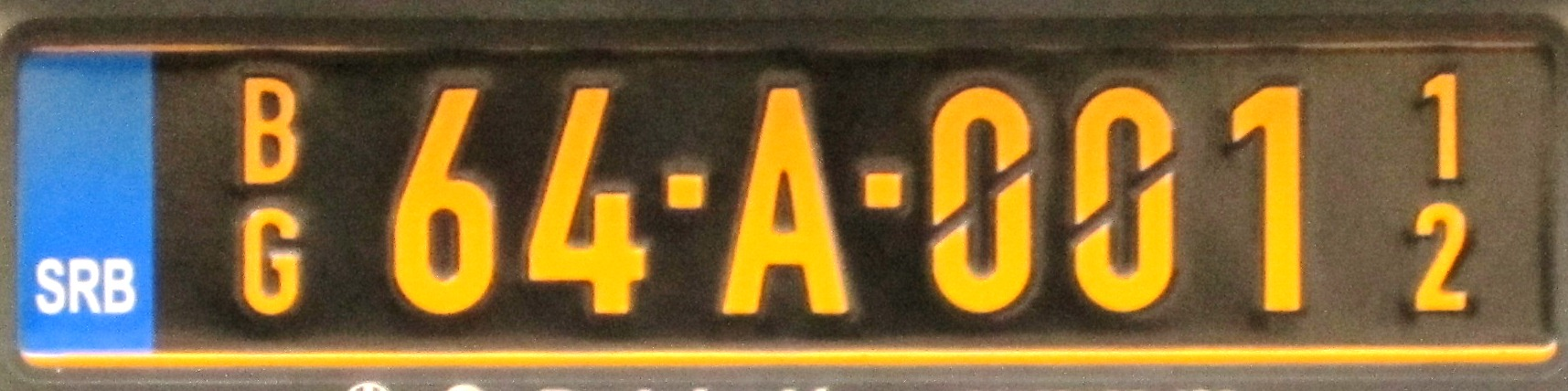 Servië CD kenteken